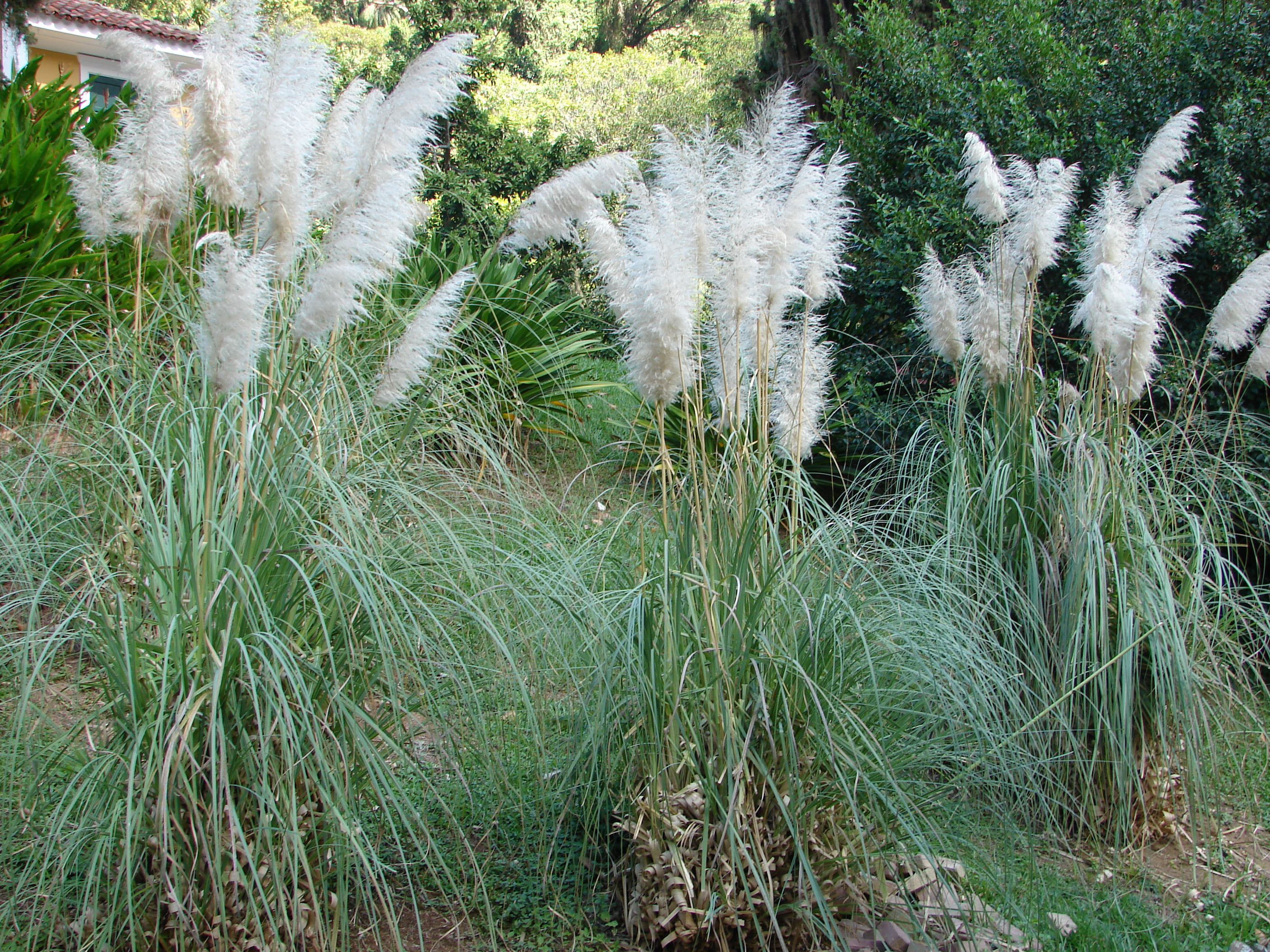 Cortaderia selloana. Picture taken at Rio de Janeiro Botanical Garden.